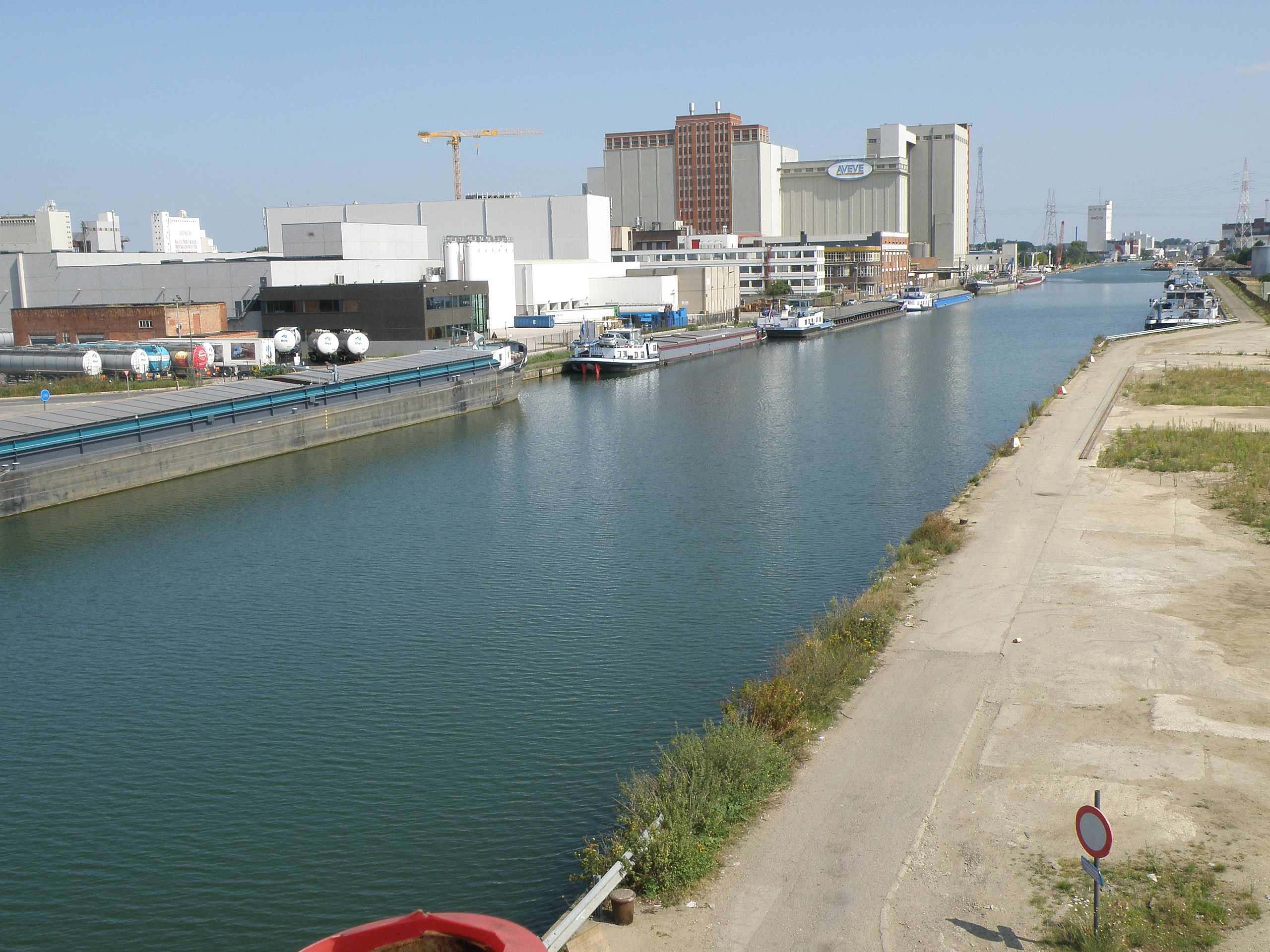 Albertkanaal te Antwerpen. Het kanaal vormt hier de grens tussen district Merksem (links) en Deurne (rechts). AVEVE-fabrieken op achtergrond links. Blikrichting oost.